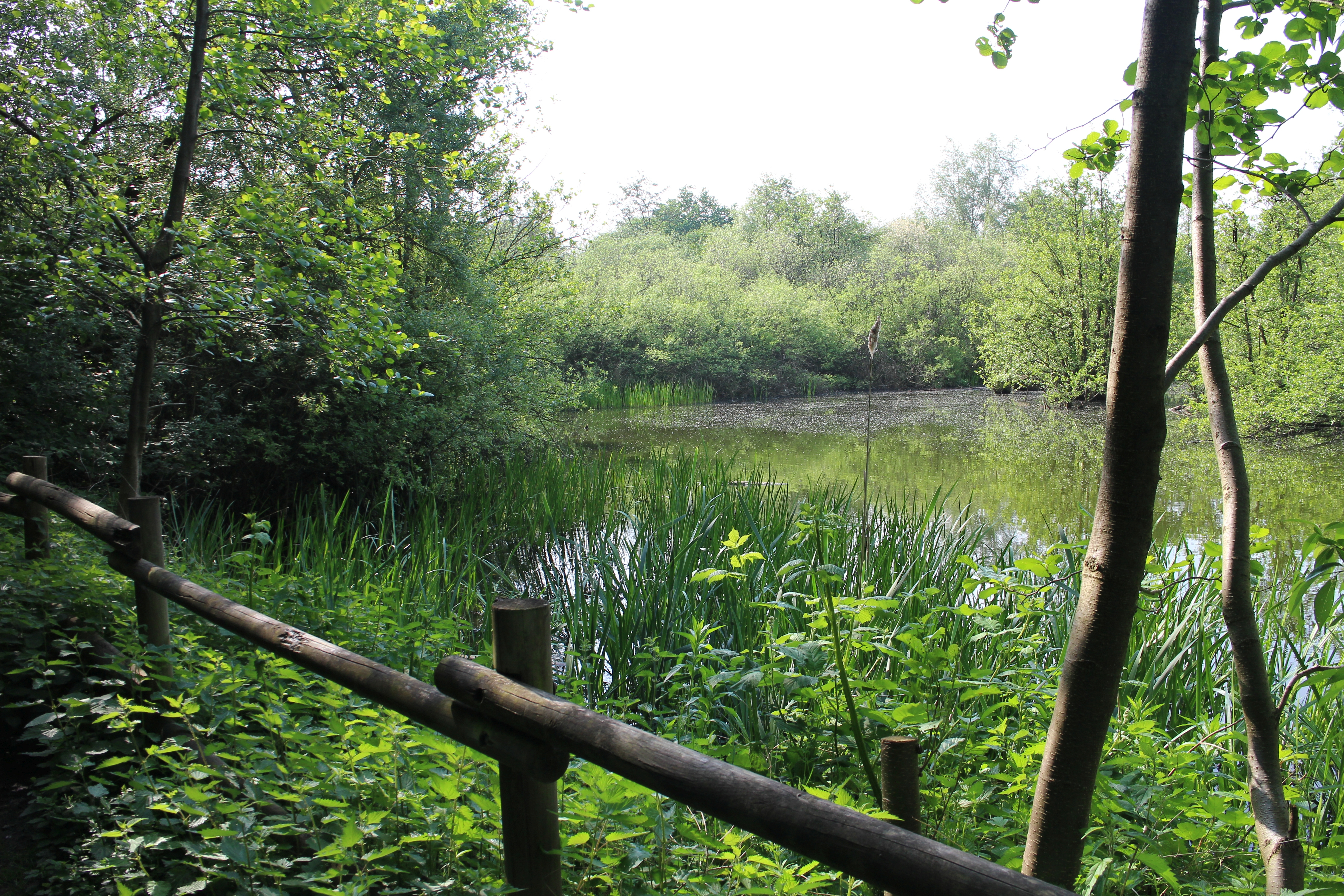 Großer Weiher im Bochumer Naturschutzgebiet Blumenkamp (BO-001) aus südwestlicher Richtung (Ansicht 2).